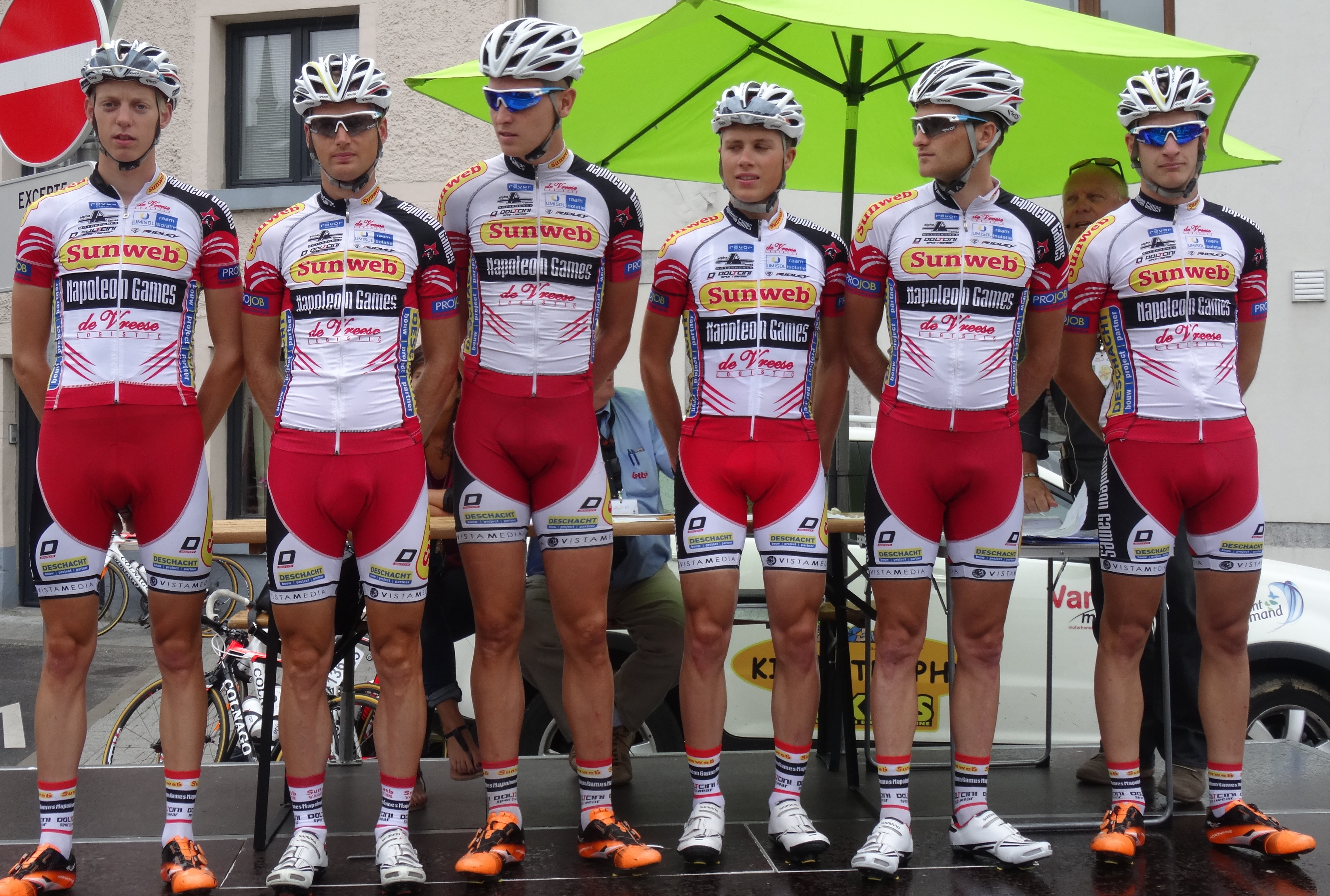 Reportage photographique réalisé le mercredi 6 août à l'occasion du départ de la première étape du Tour de la province de Namur 2014 à Jambes (Namur), Belgique.